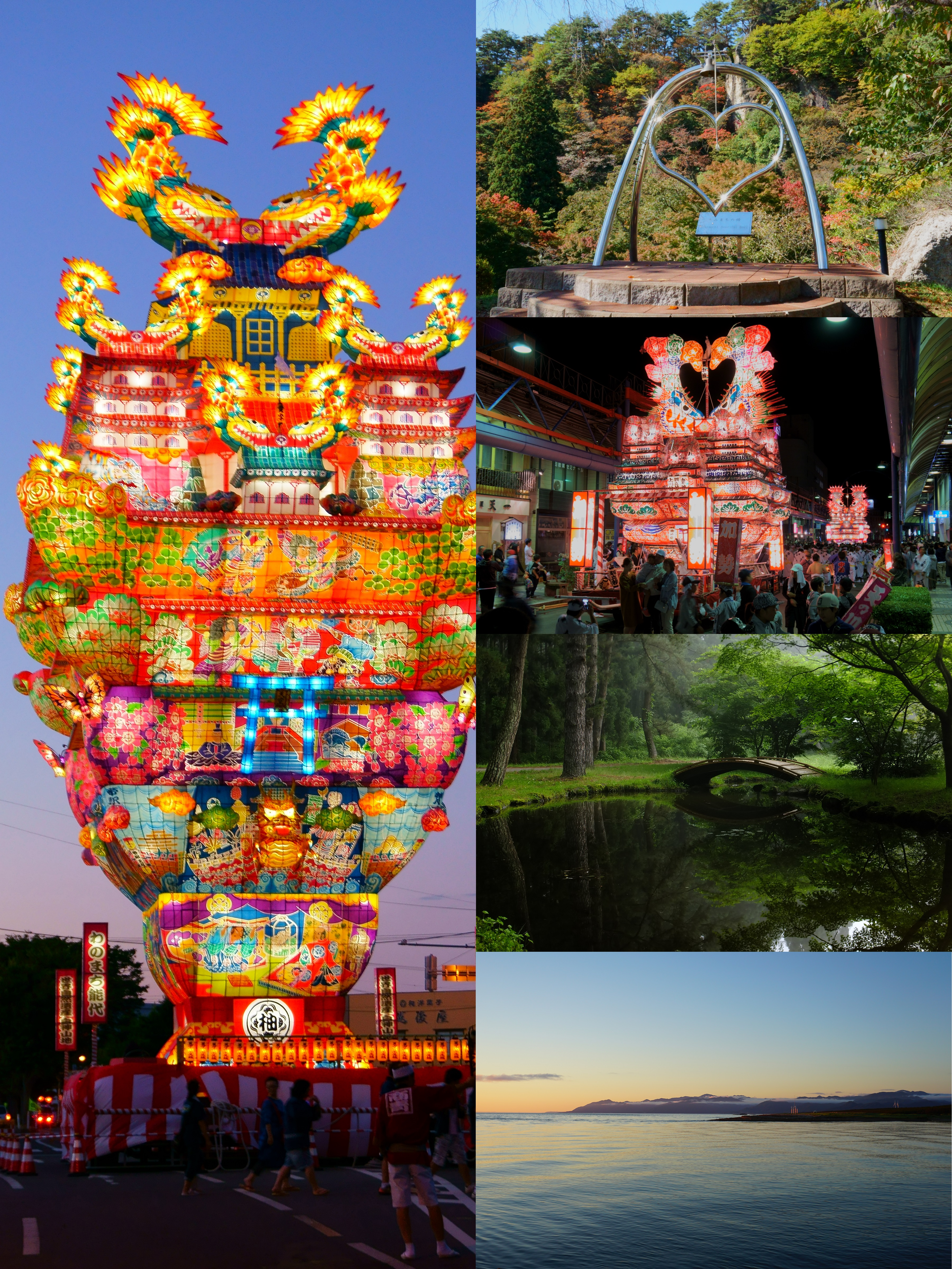 秋田県能代市のモンタージュ画像。素材は全て投稿者である掬茶が撮影、合成したもの。画面左は能代七夕「天空の不夜城」。画面右上から順に米代川の下流へ進んでいく。画面右列は上から順に二ツ井地域の観光地「きみまち坂」、能代市中心街の伝統的な夏祭り「能代役七夕」、木都能代を象徴する「風の松原」、能代市の母なる川「米代川」の河口と日本海、彼方には白神山地を望む。